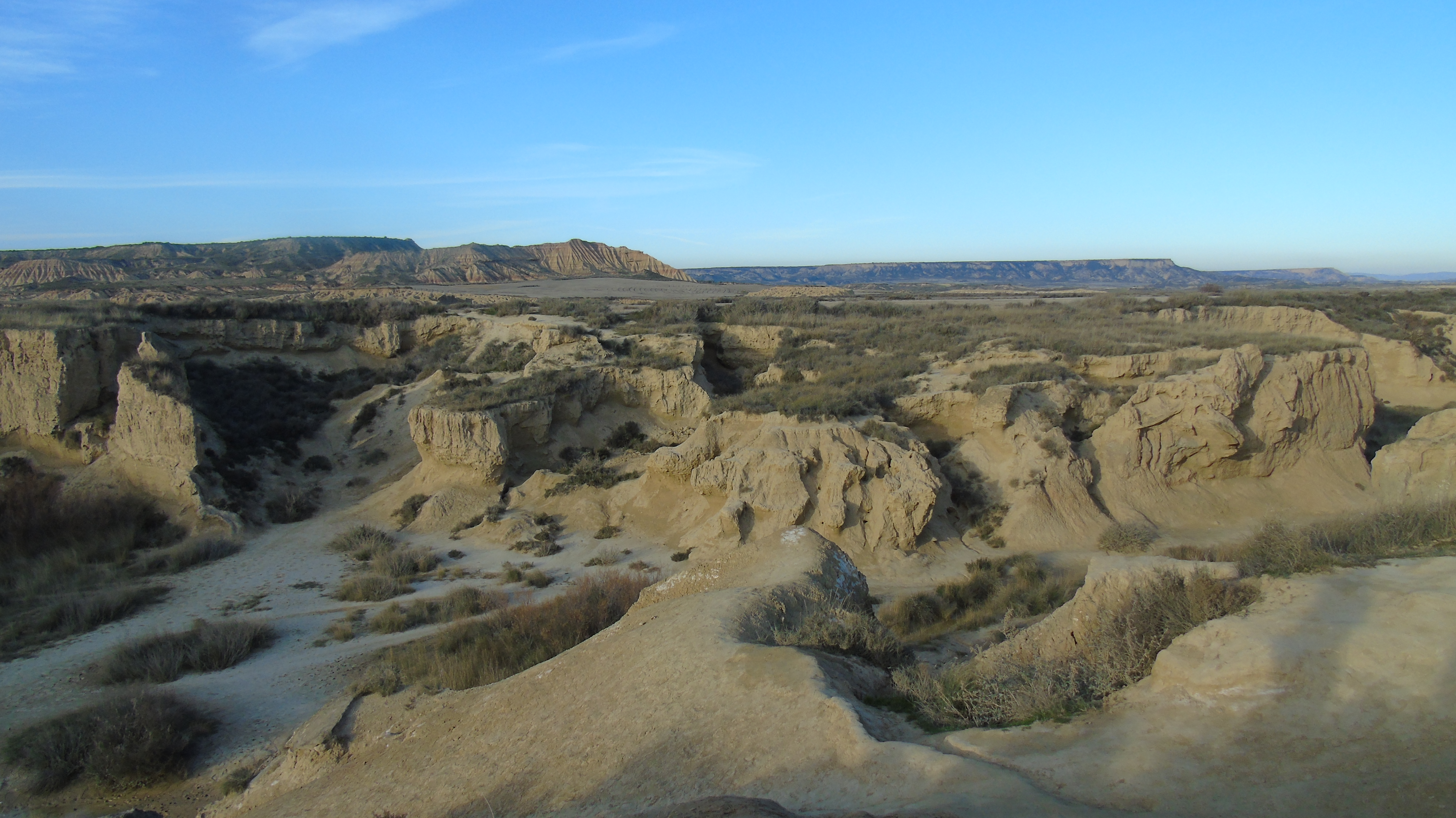 Árido y extenso, donde los hombres se pierden y no vuelven.